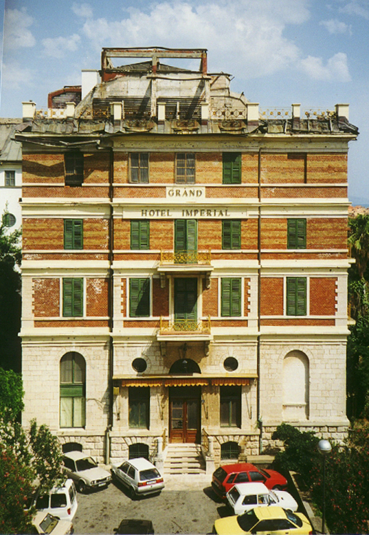 Hotel Imperial at Dubrovnik after serbian bombardement.